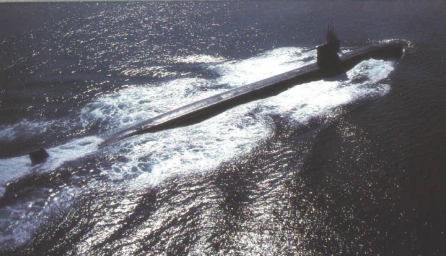 Angriffs-U-Boot USS-Los-Angeles Klasse